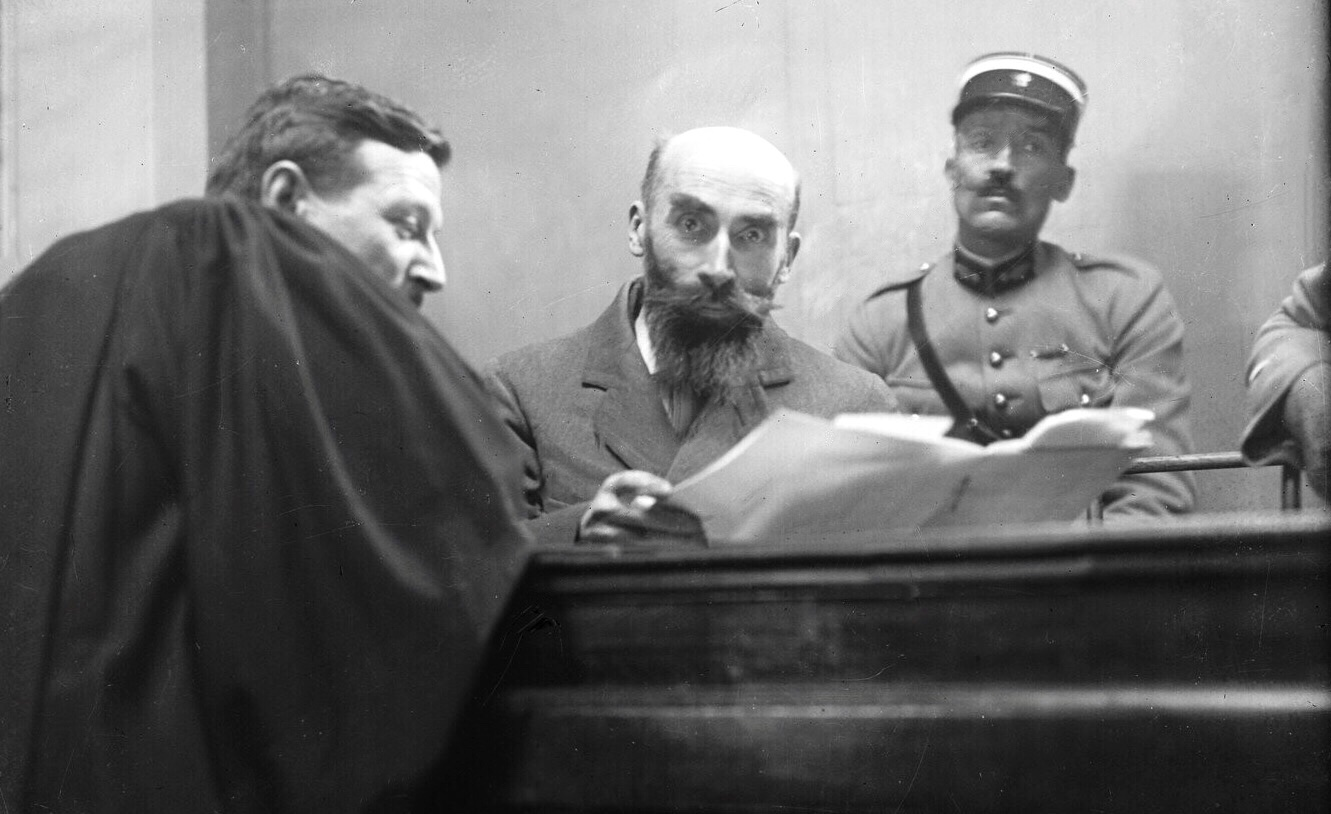 Landru durant son procès à la cour d'assises à Versailles du 7 au 30 novembre 1921, photographie de presse, négatif sur verre, 9 x 12 cm (sup.).